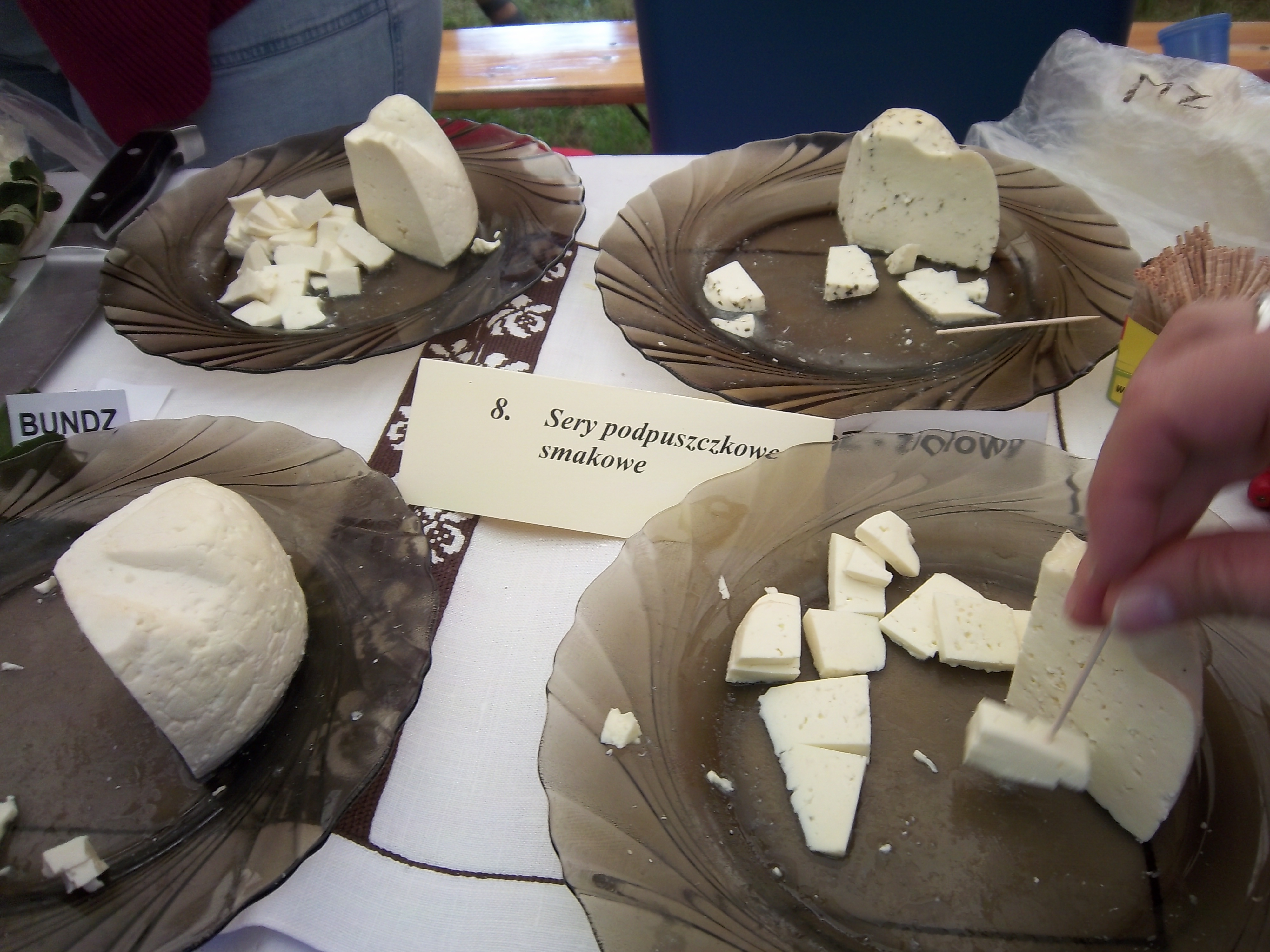 Jarmark Produktów Tradycyjnych w Skansenie i XI edycja Ogólnopolskiego Konkursu „Nasze kulinarne dziedzictwo - smaki regionów""